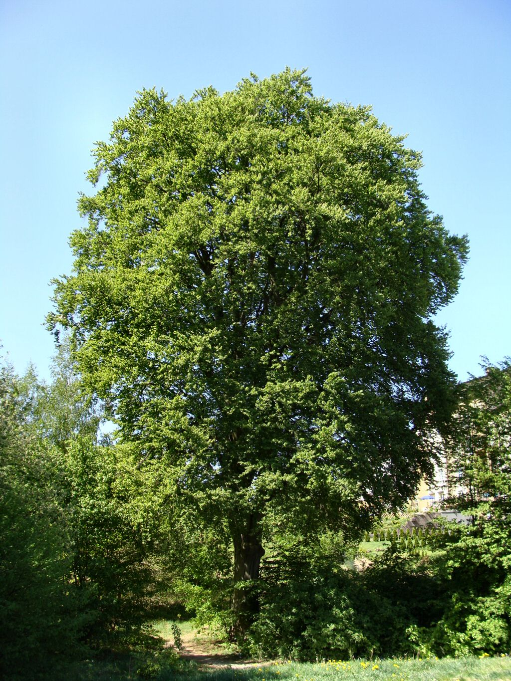 Buk im. Wojciecha Lipniackiego na obrzeżach Osiedla Bukowego w Szczecinie